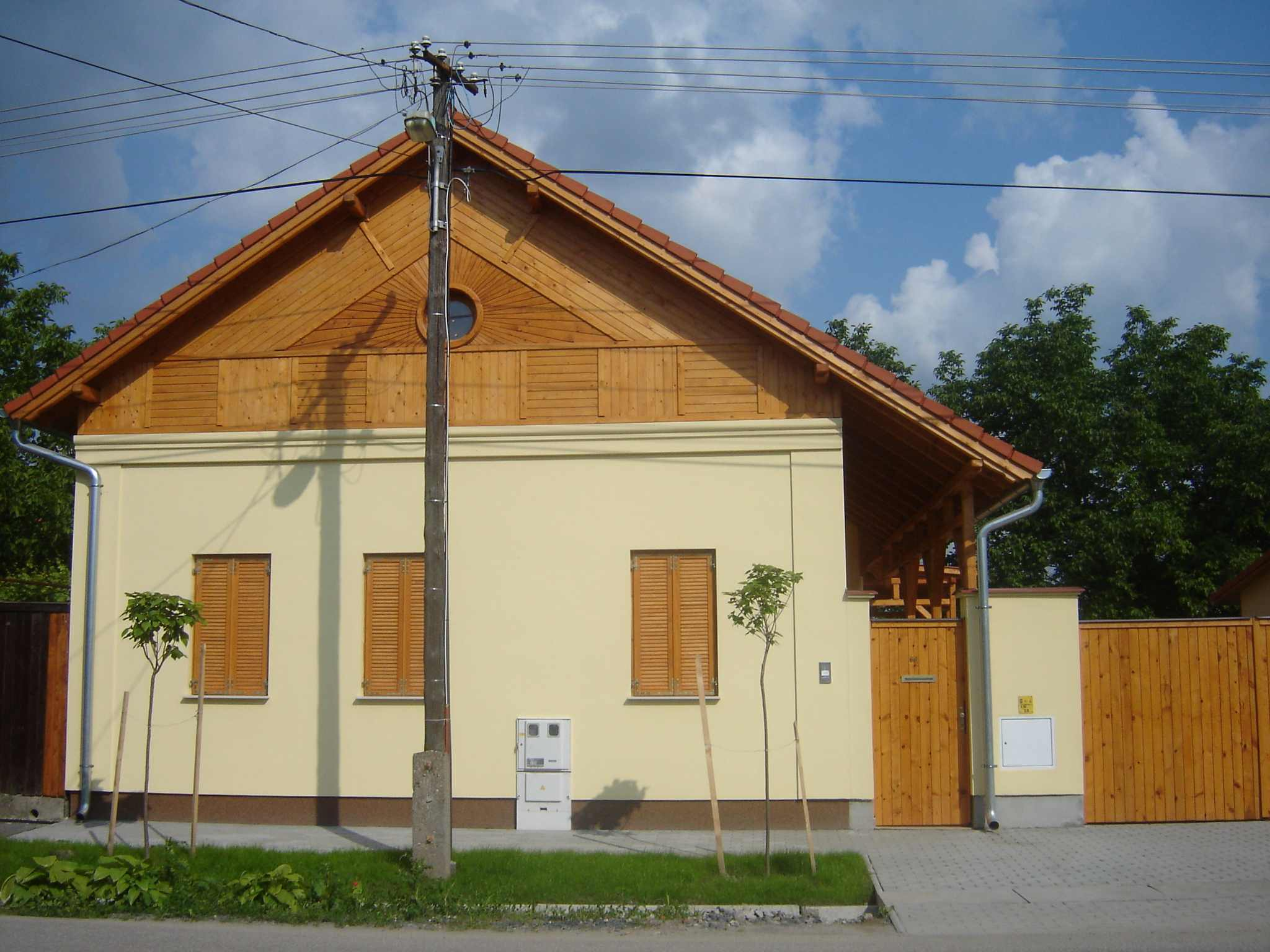 Új napsugaras ház, Szeged-Alsóváros (épült 2006-ban)